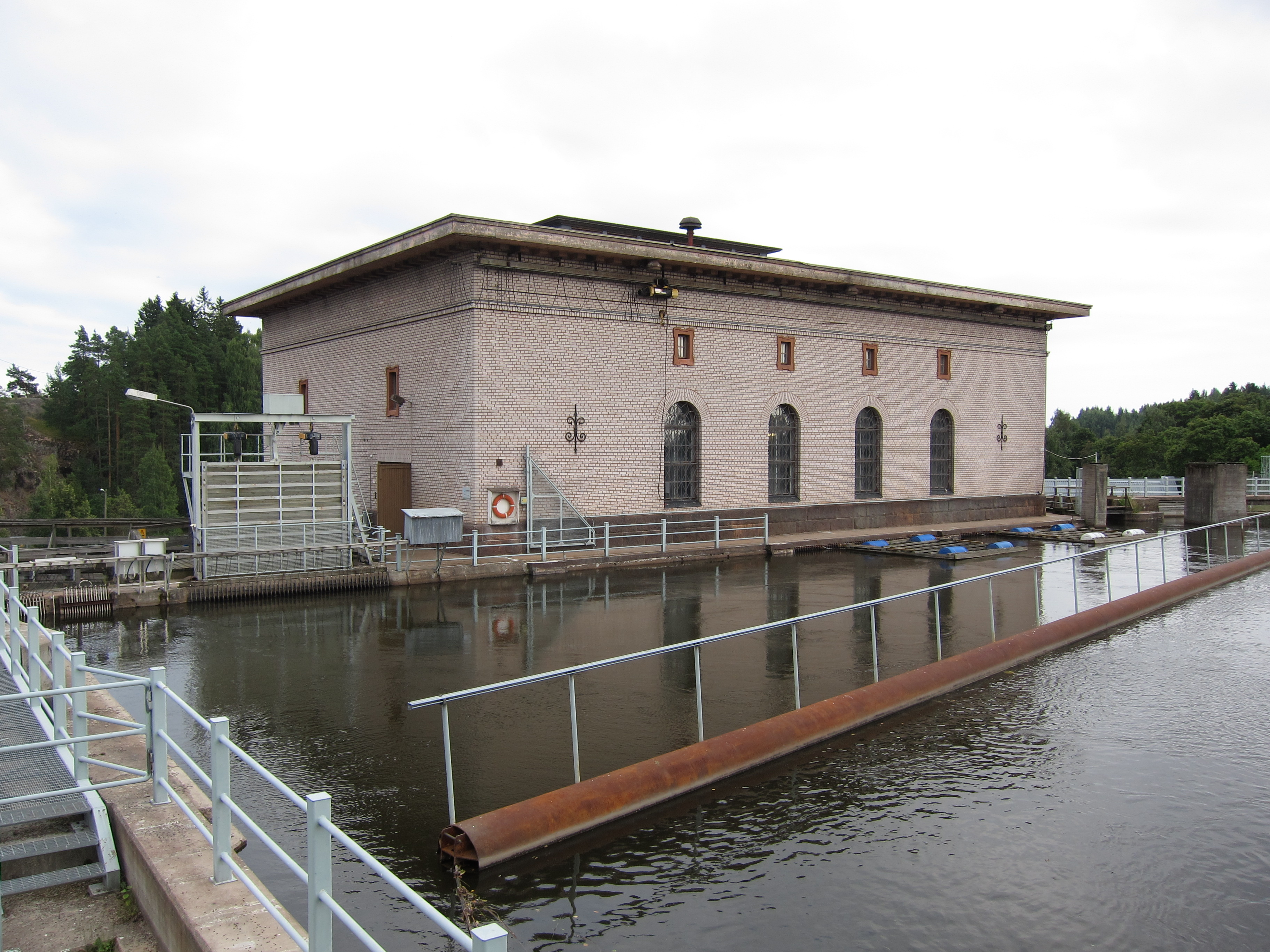 Korkeakosken vesivoimalaitos Kotkassa Kymijoen Korkeakoskenhaarassa.